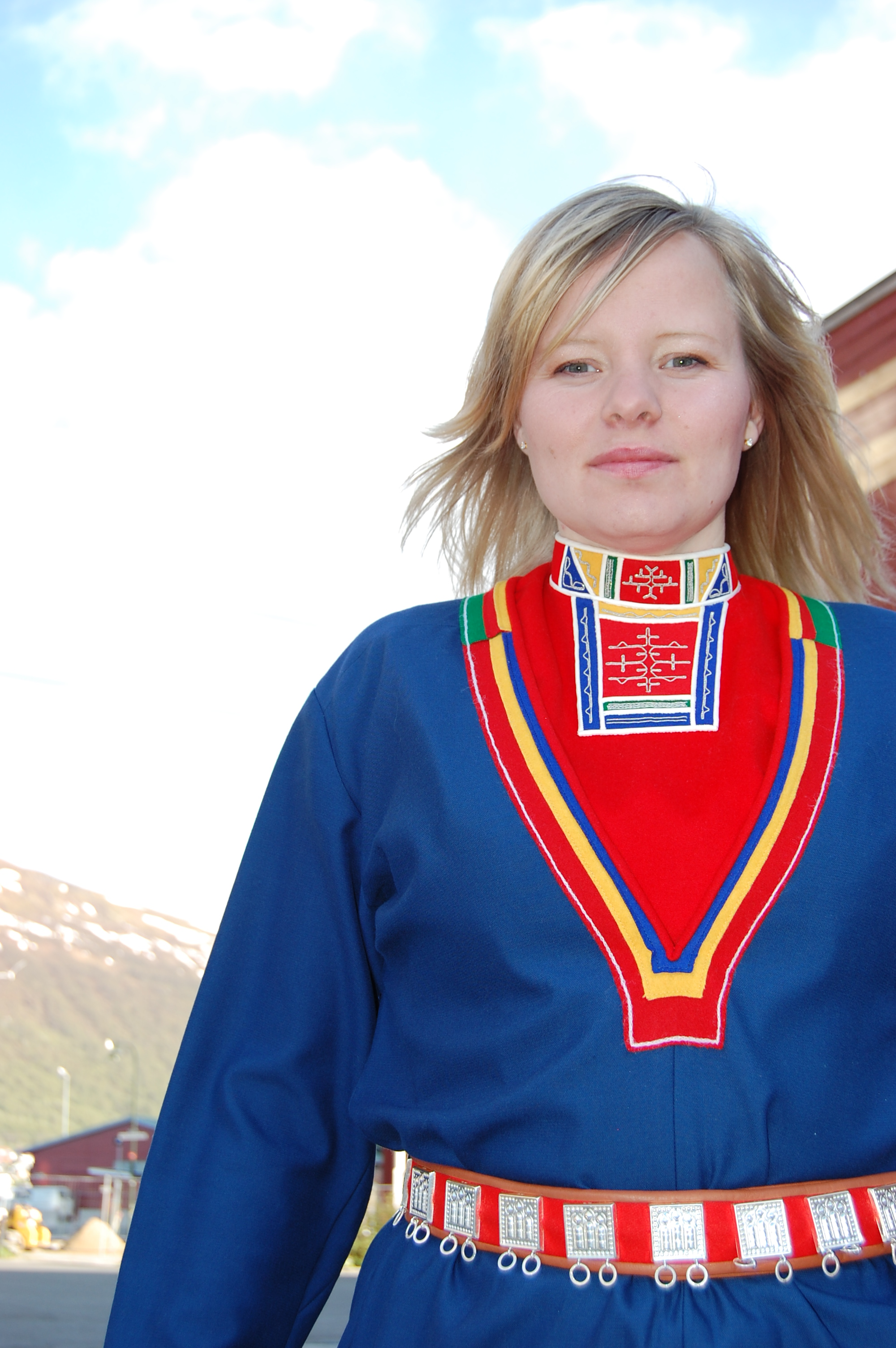 Kirsti Guvsám er sametingsrepresentant for Norske Samers Riksforbund (NSR), og 1. kandidat ved sametingsvalget 2009 i Sør-Norge valgkrets.